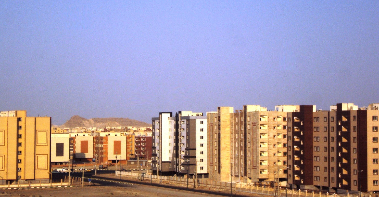 شهرک پردیسان